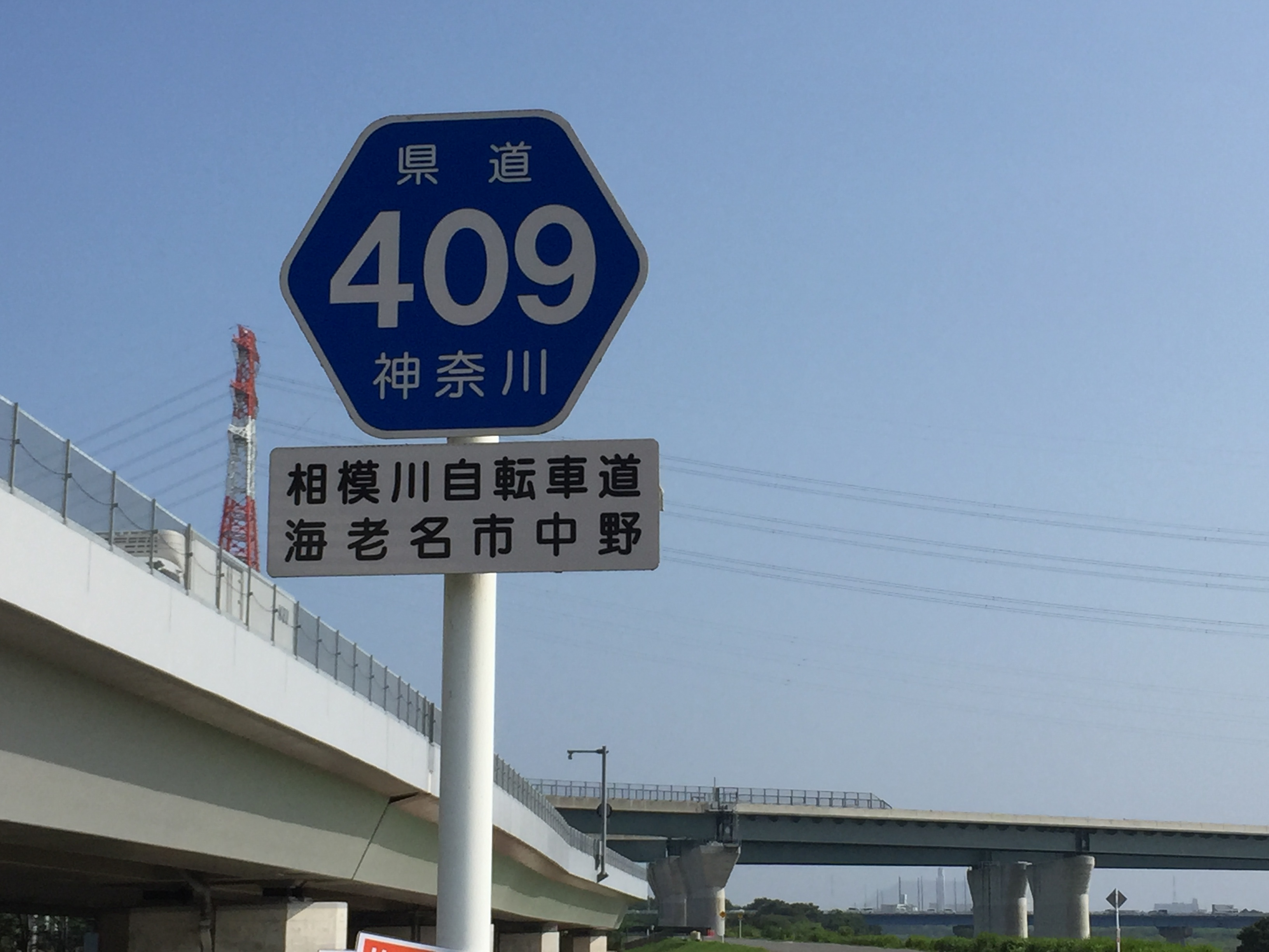 神奈川県道409号線番号標示（海老名市中野）